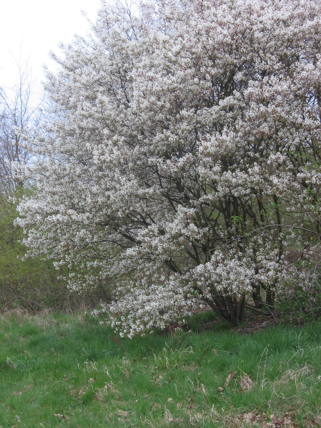 Amelanchier lamarckii struik (bush)